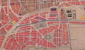 Plan Berlage, Den Haag, Laakkwartier, 1908